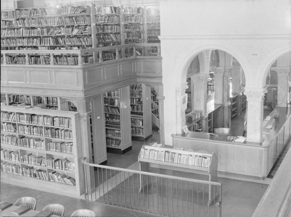 Nous voyons l'intérieur de la bibliothèque publique de Westmount, 4550 rue Sherbrooke à Westmount, avec ses rangées d'étagères remplies de volumes et ses boiseries. Nous apercevons au centre le comptoir du prêt sous une série d'arches.